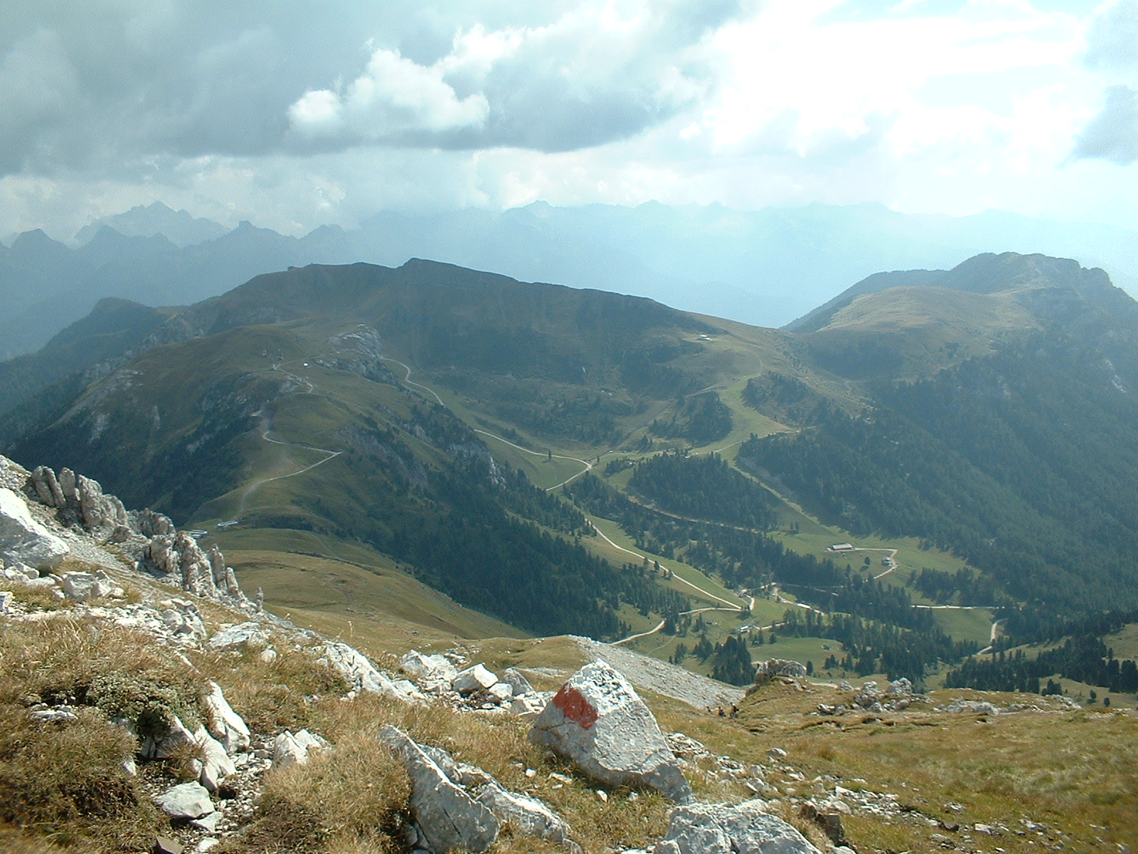 Passo Feudo visto dal Latemar (sullo sfondo il Dos Capel ed il monte Agnello)